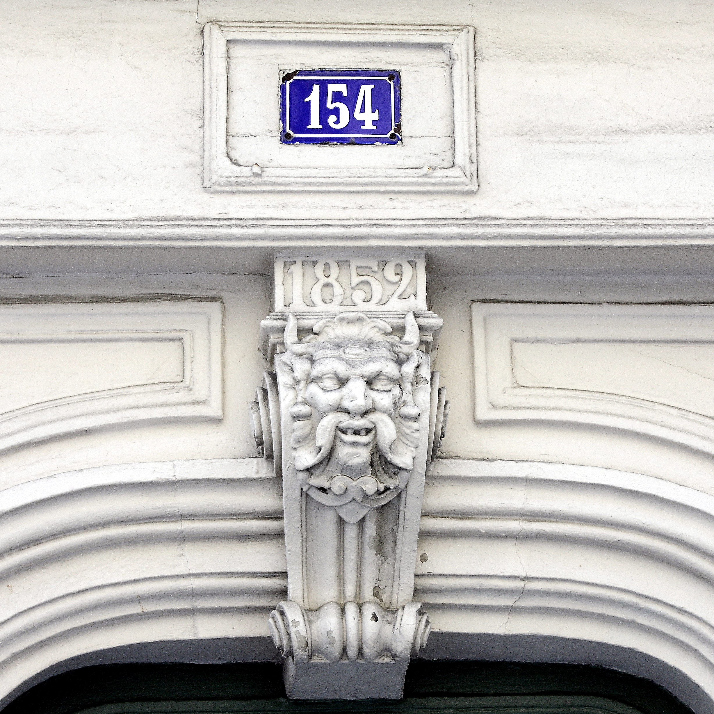 Rue du Château (Paris)